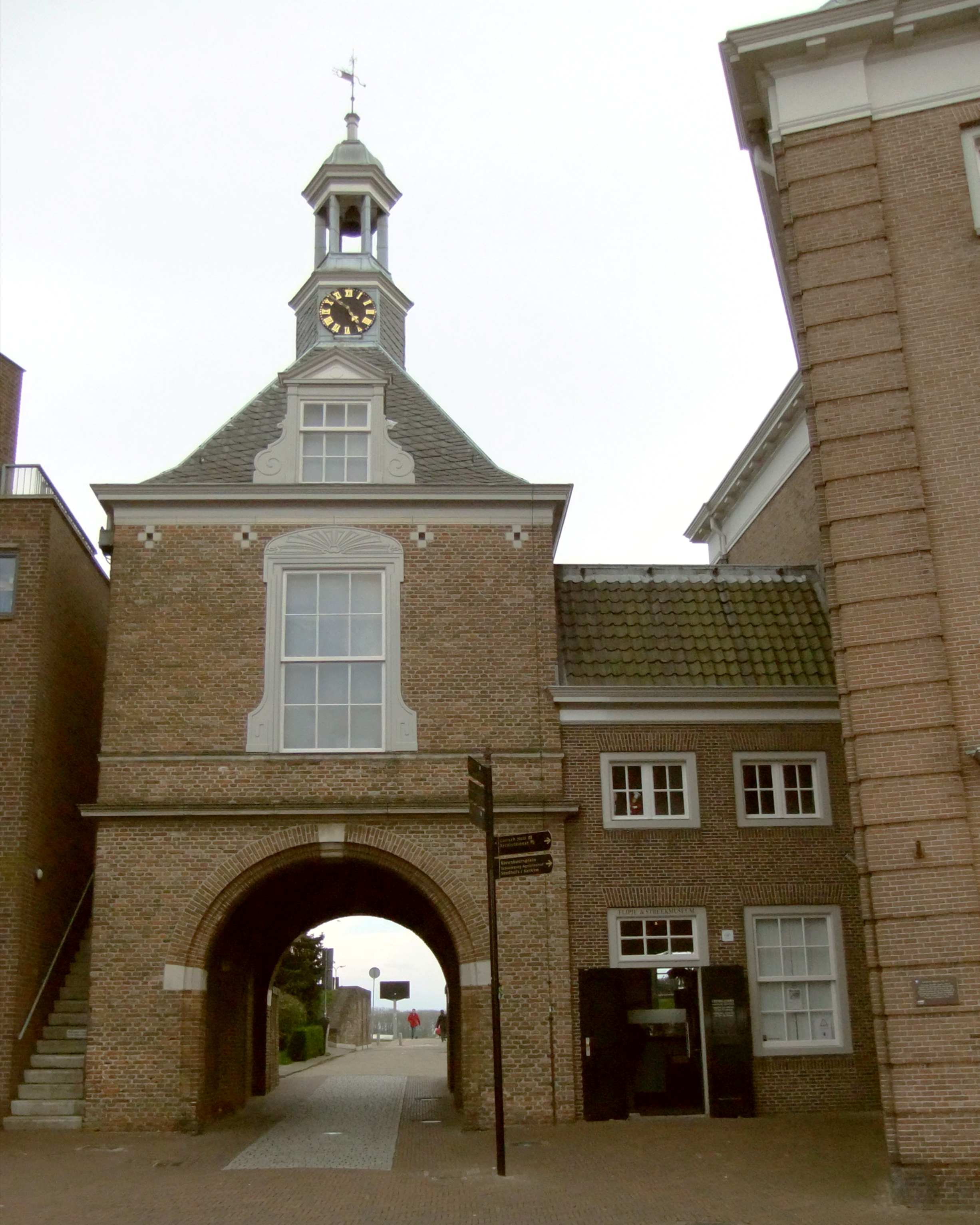 De Waterpoort, een restant van de vestingwerken in Tiel